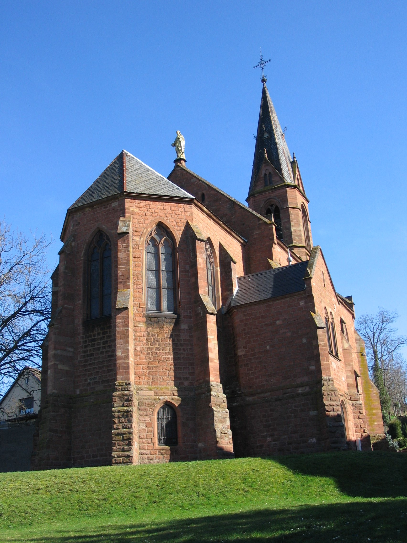 église catholique Saint Jean Baptiste de Scharrachbergheim (Bas-Rhin) construite en grès des Vosges au 19è siècle.